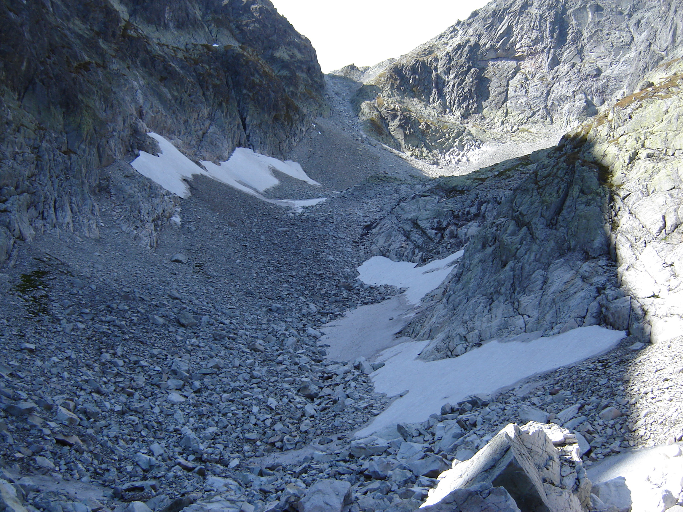 Sedielko